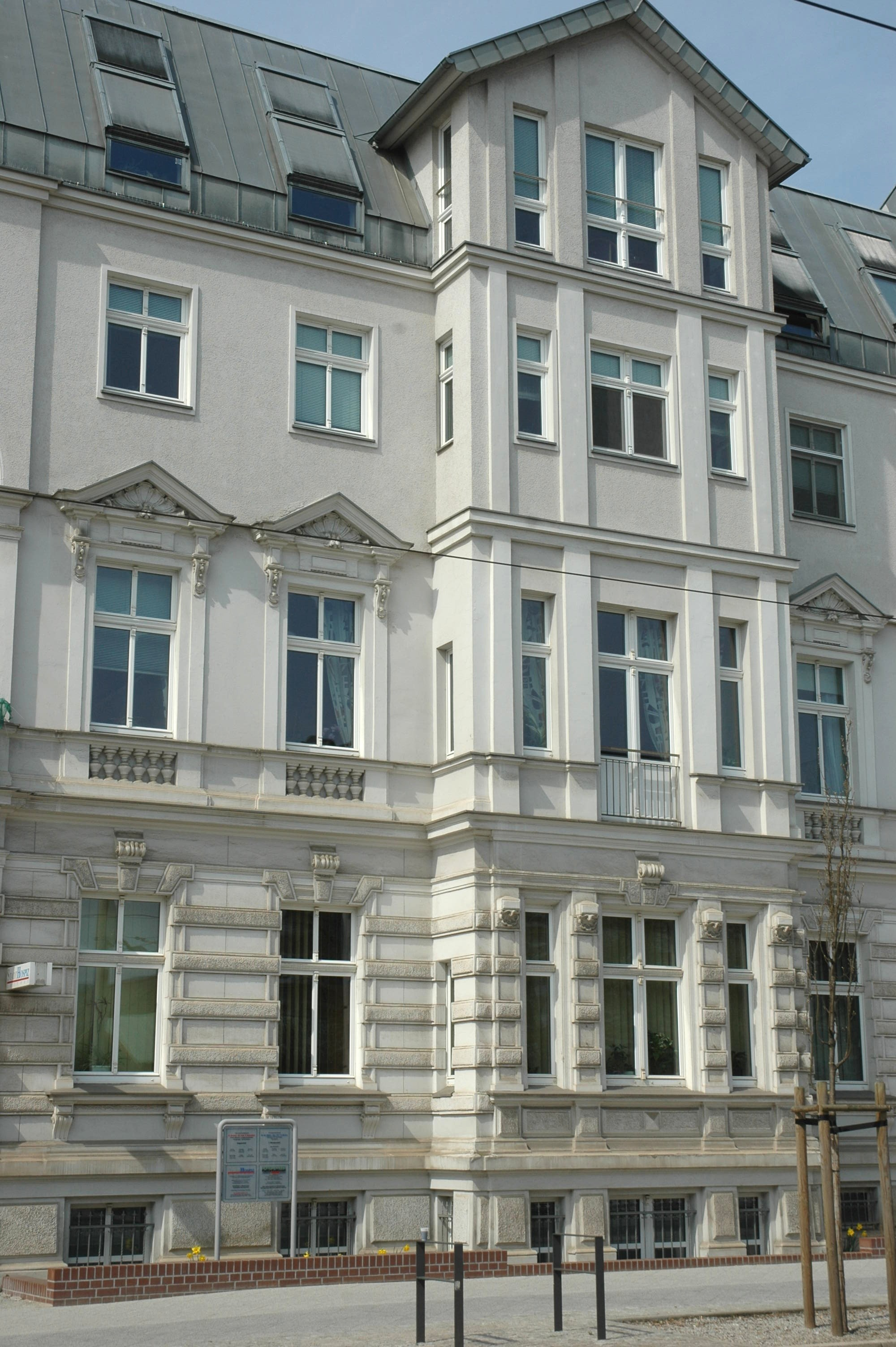 Bahnhofstraße 62